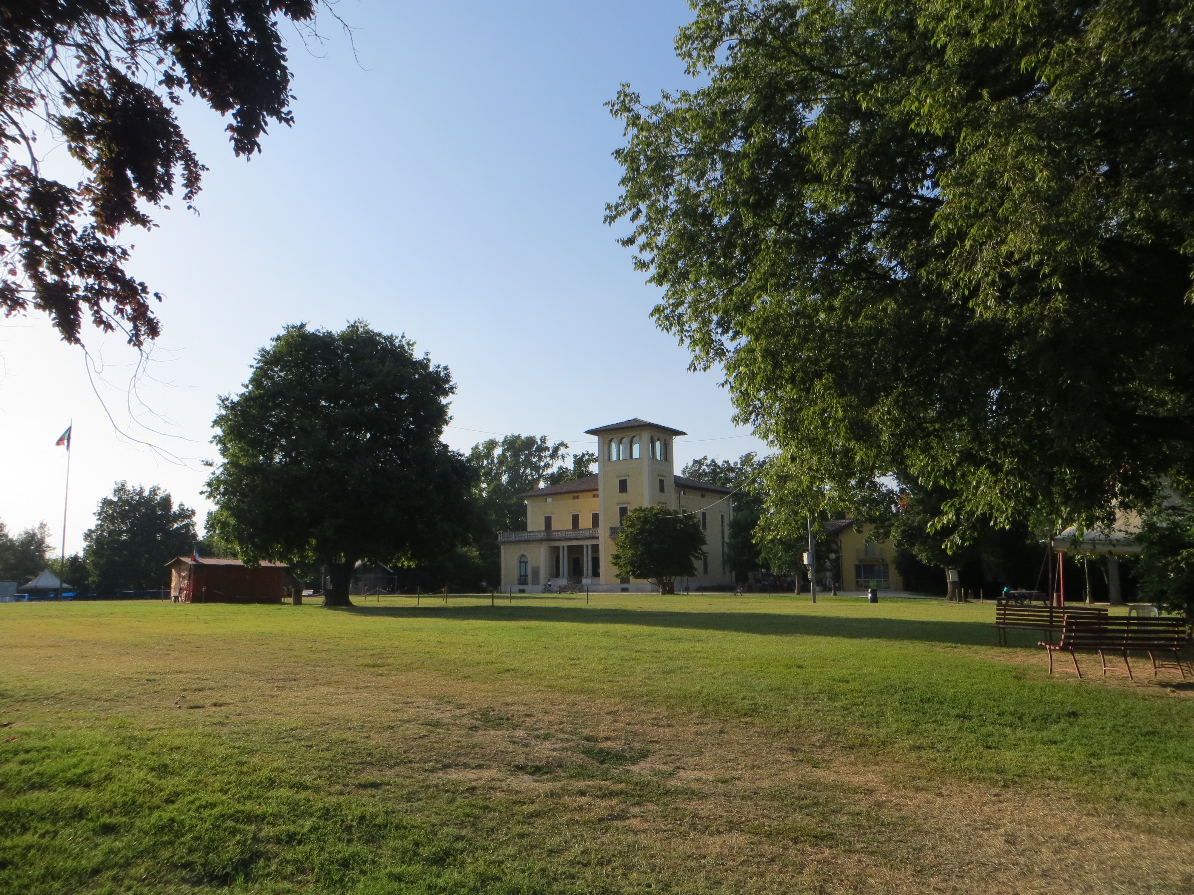 Villa Soragna (Collecchio) - parco Nevicati antistante alla villa